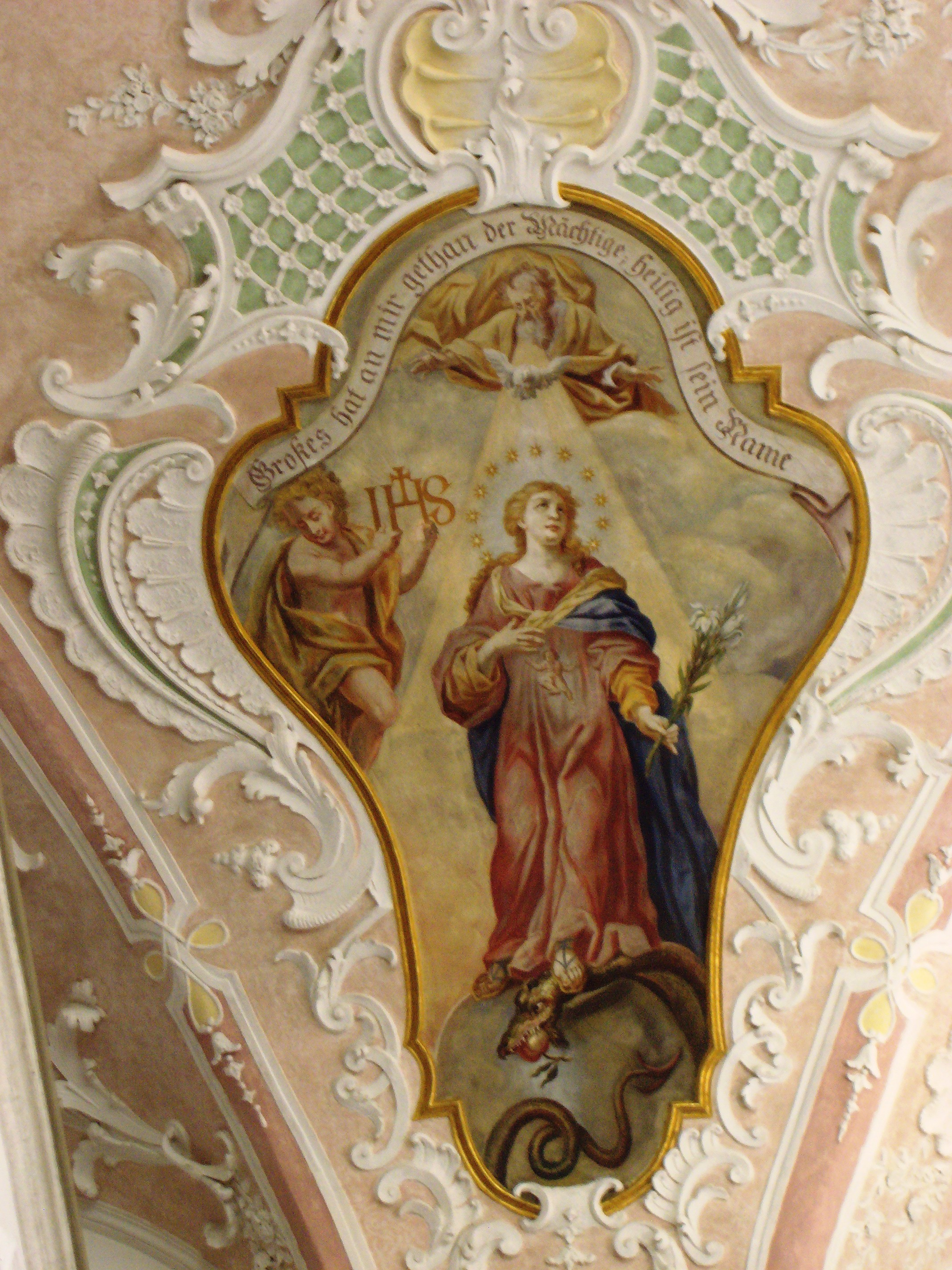 Pfarrkirche Mariä Verkündigung, Fuchstal, Germany, Deckenfresko, Magnifikat